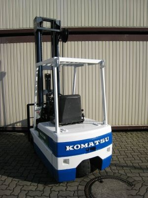 Komatsu FB18M12 Elektrostapler, Frontstapler, dreifaches Hubgerüst, Hubhöhe 6750 mm, Tragfähigkeit 1800 kg, Bauhöhe 3080 mm